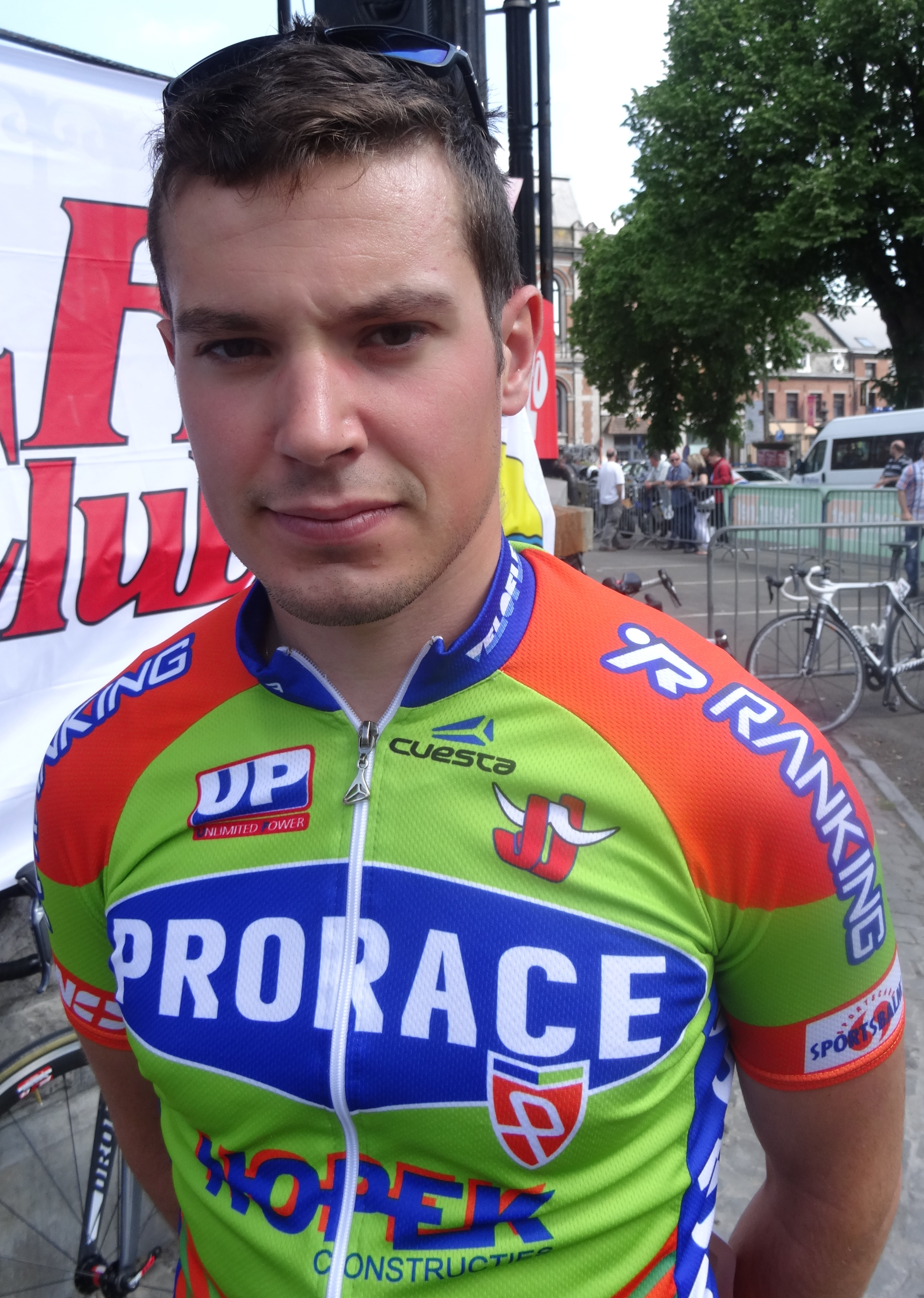 Reportage réalisé le samedi 17 mai à l'occasion du départ du Grand Prix Criquielion 2014 à Boussu, Belgique.